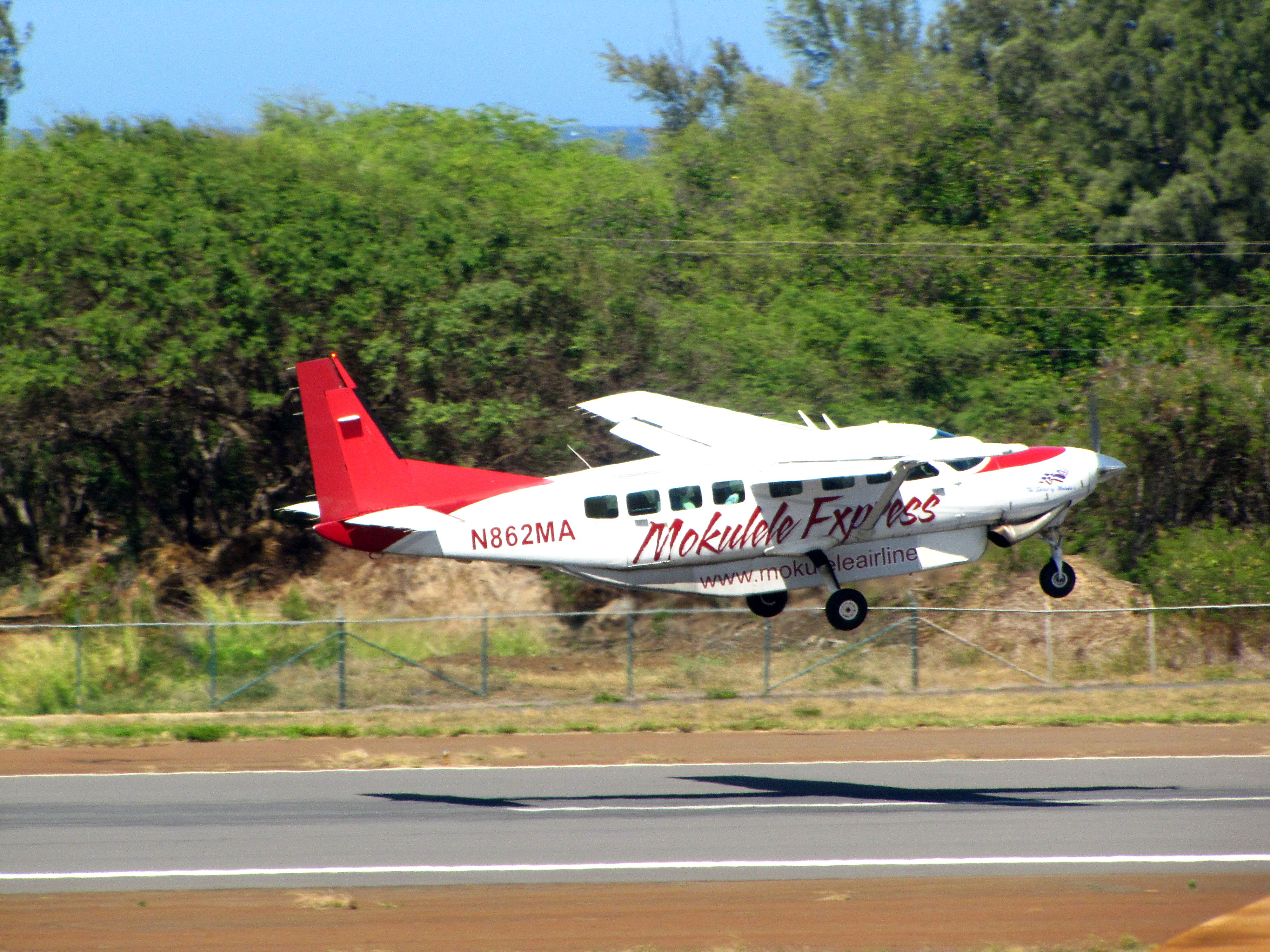 Mokulele Airlines Cessna 208B Grand Caravan Kahului Airport